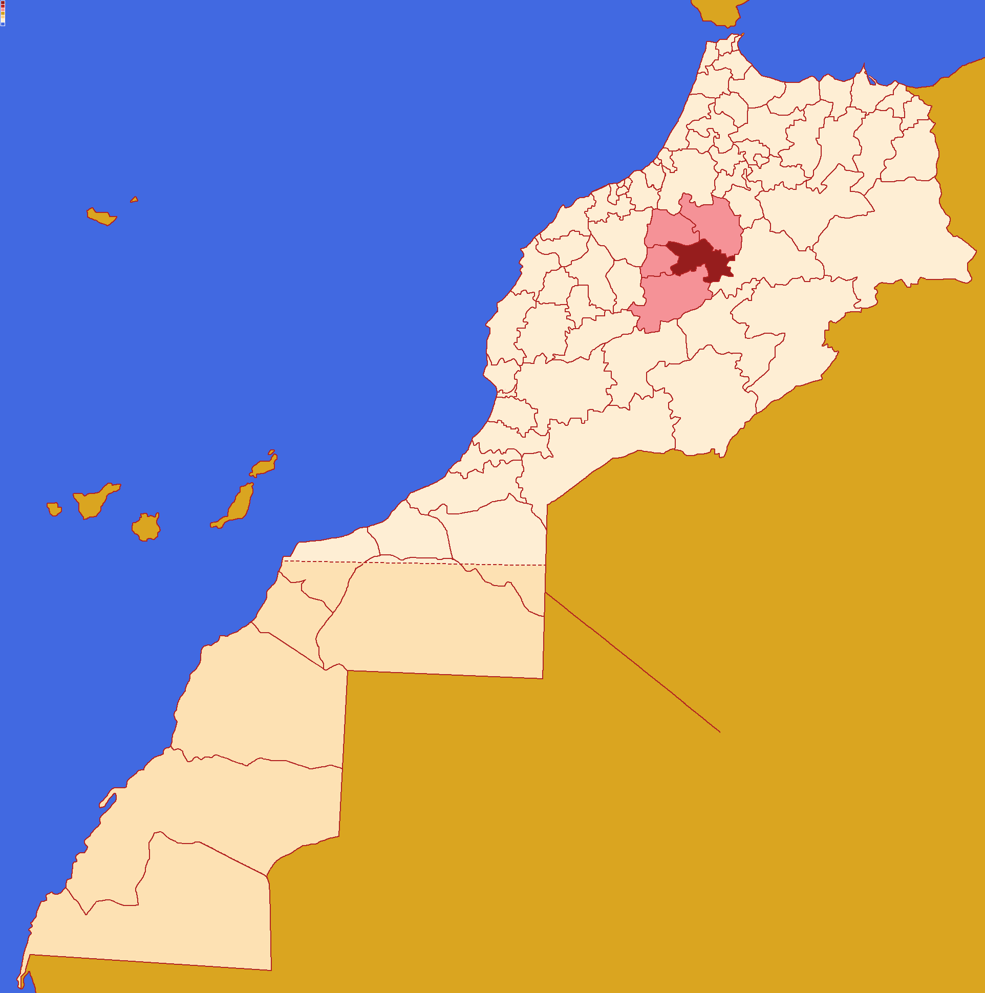 Localização da província de Beni Mellal ,dentro da região de Beni Mellal-Quenifra ,dentro de Marrocos.Conforme a reforma administrativa de 2015.